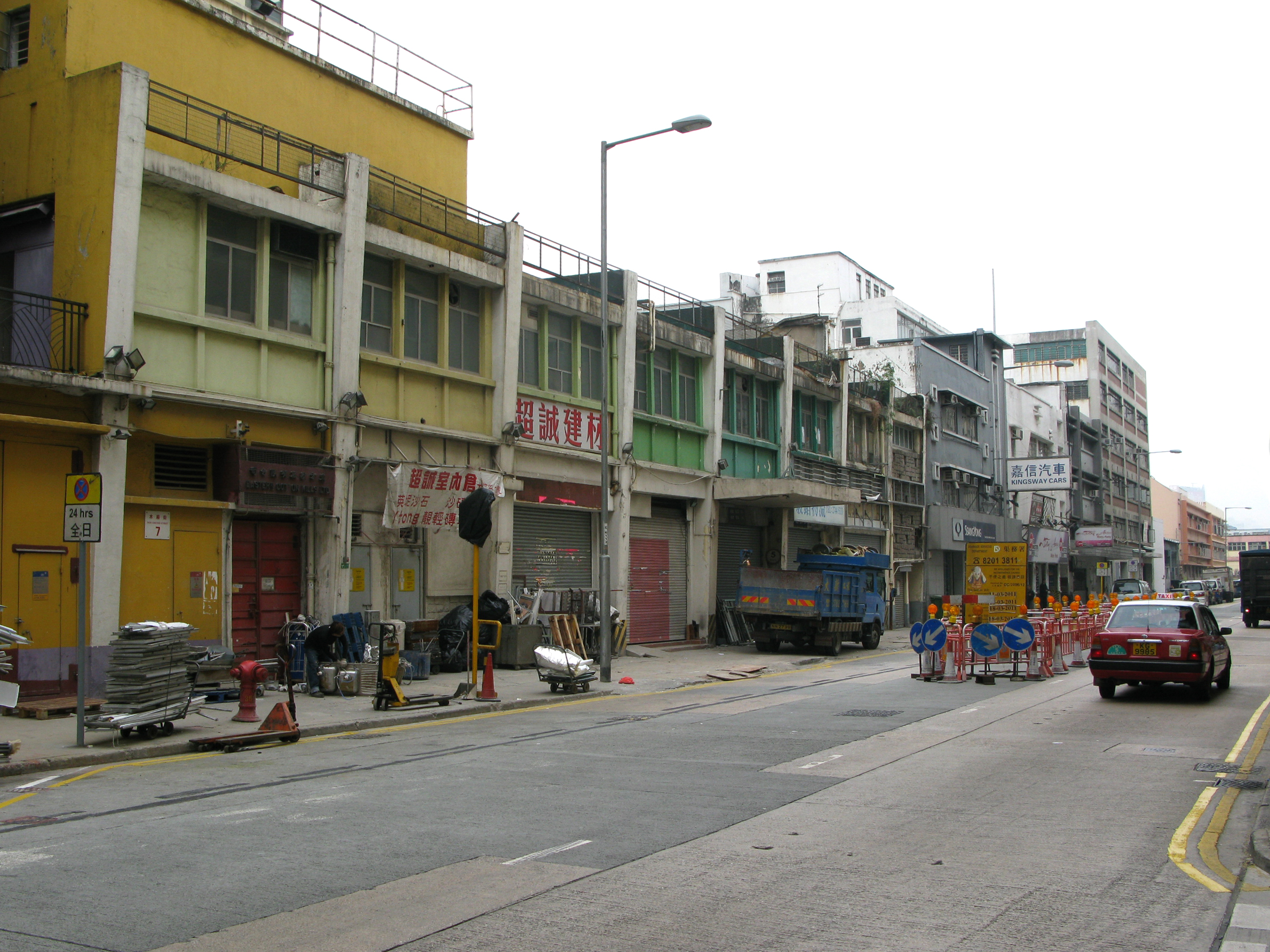 中文（香港）: 香港九龍土瓜灣十三街木廠街